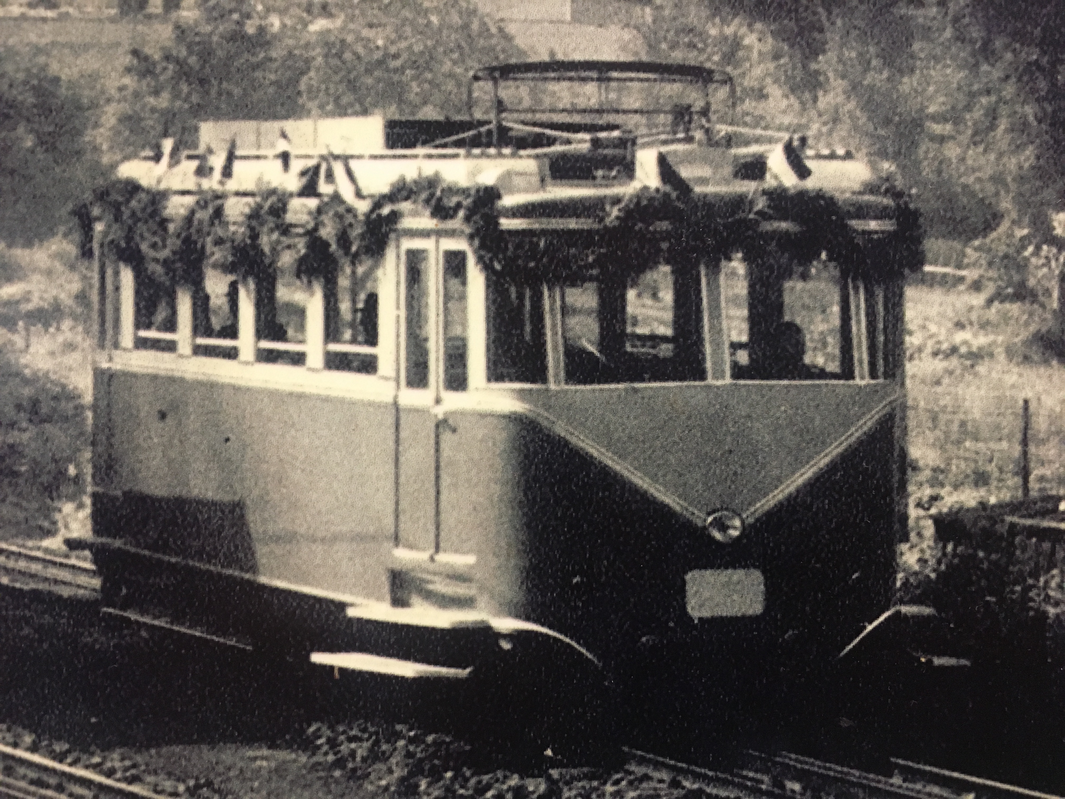 Triebwagen ET I auf seiner Jungfernfahrt (1953)